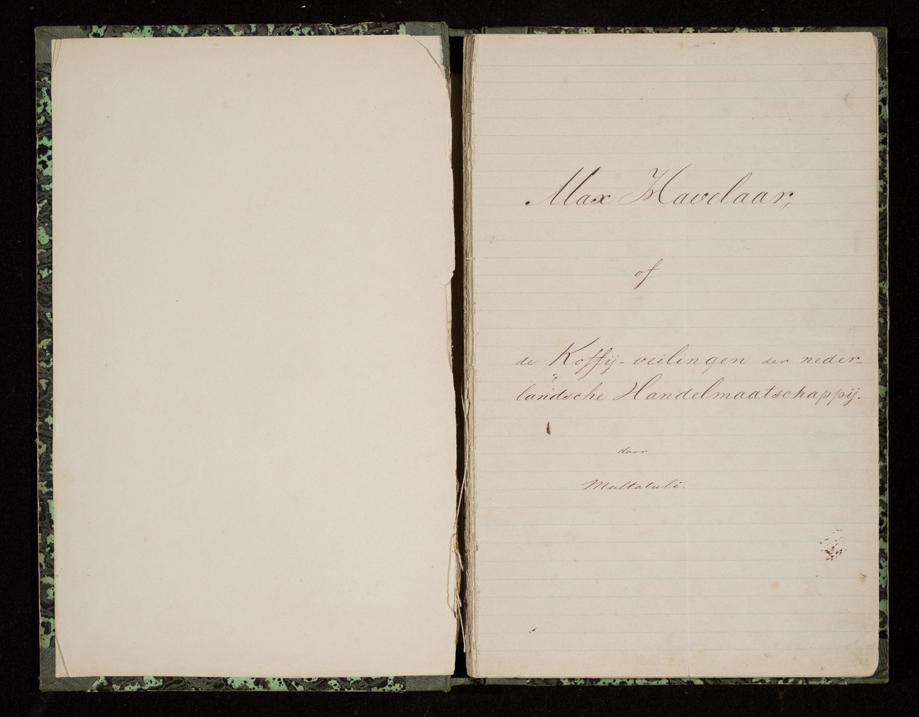 manuscripttitelpagina